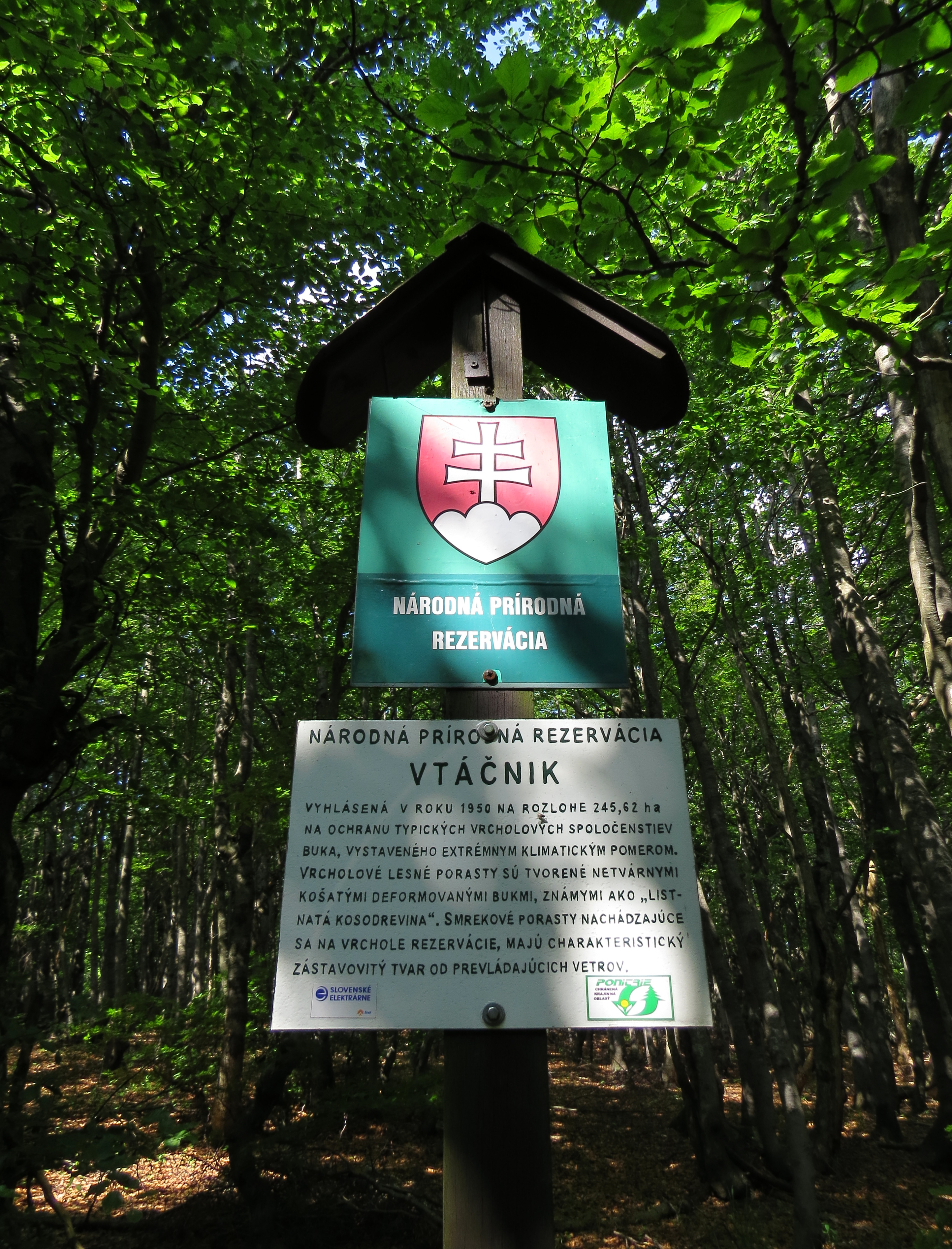 Hranice NPR Vtáčnik